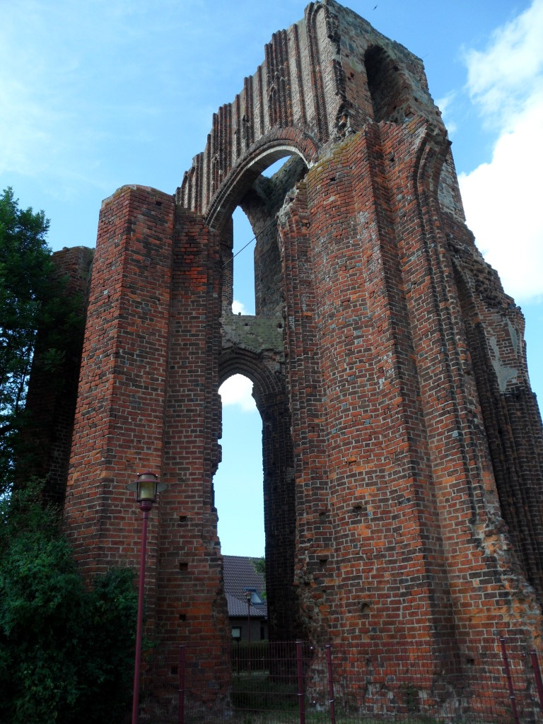 Ruine des Prämonstratenserklosters Gramzow